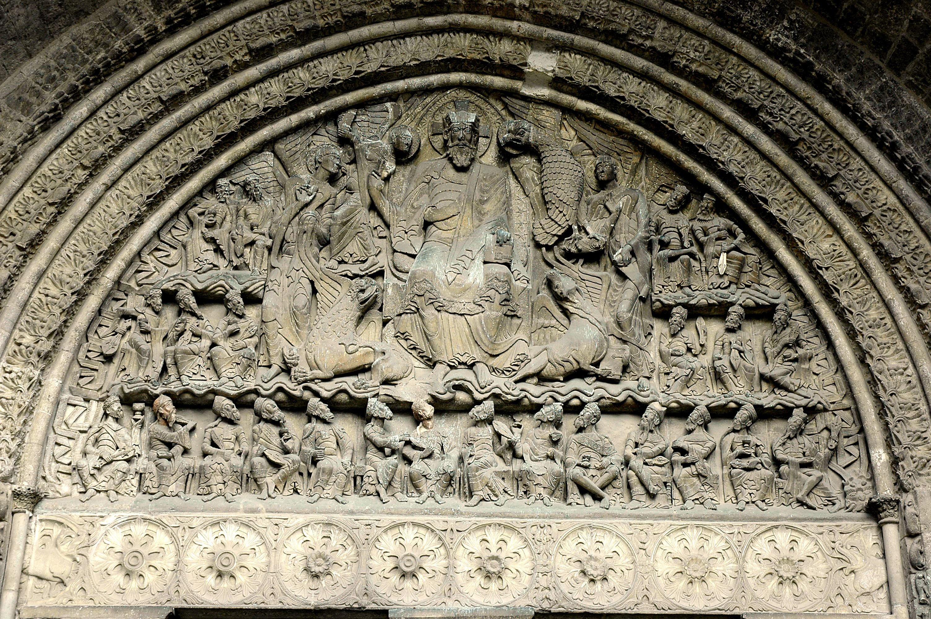 Abadia de Saint-Pierre de Moissac - Portalada Sud de Moissac